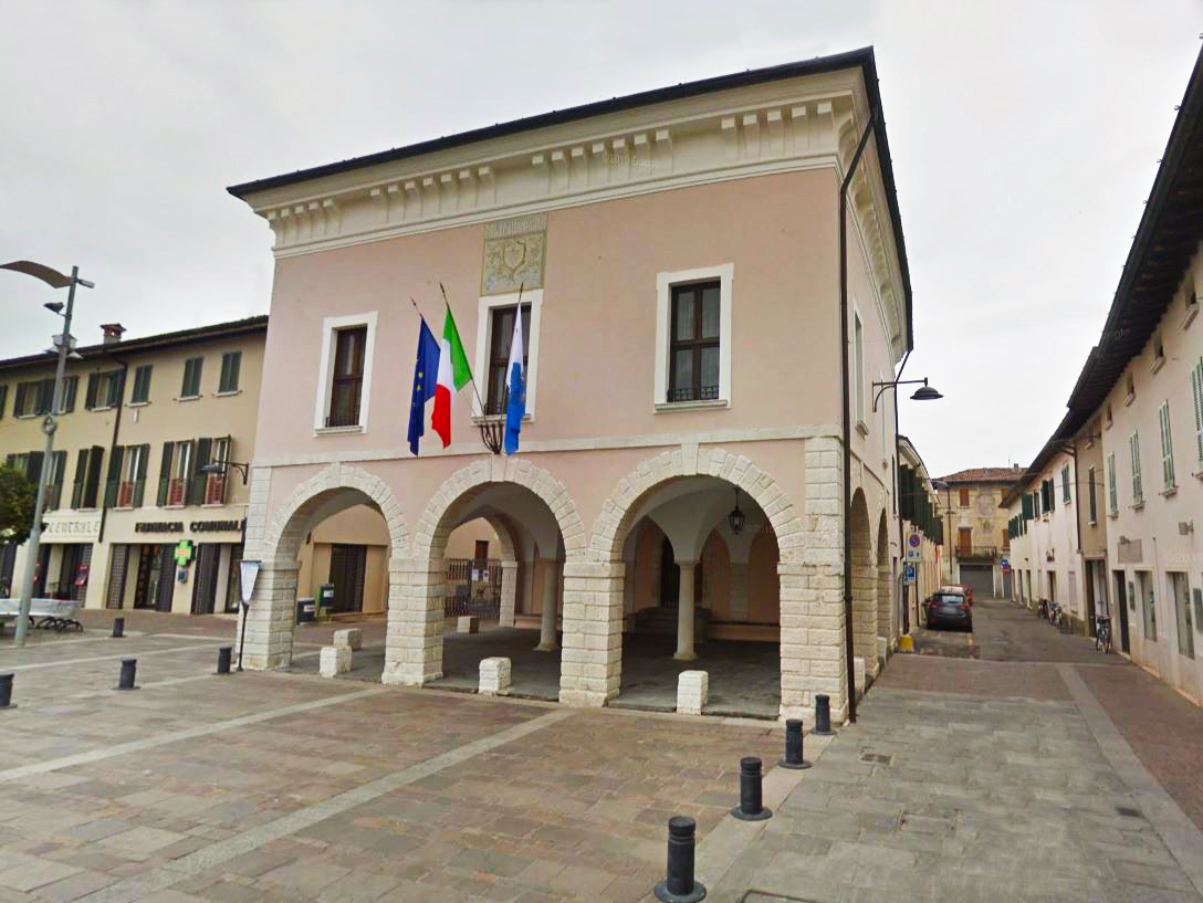 Il palazzo del comune a Travagliato